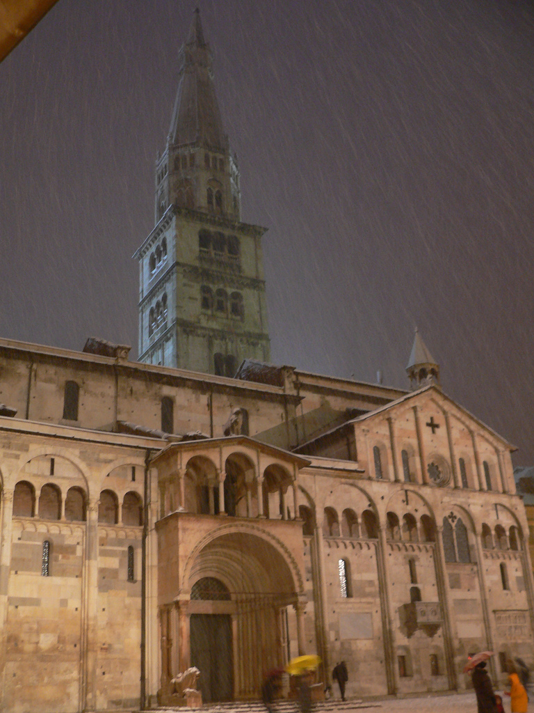 Duomo Moodena, Emilia Romagna, Italia